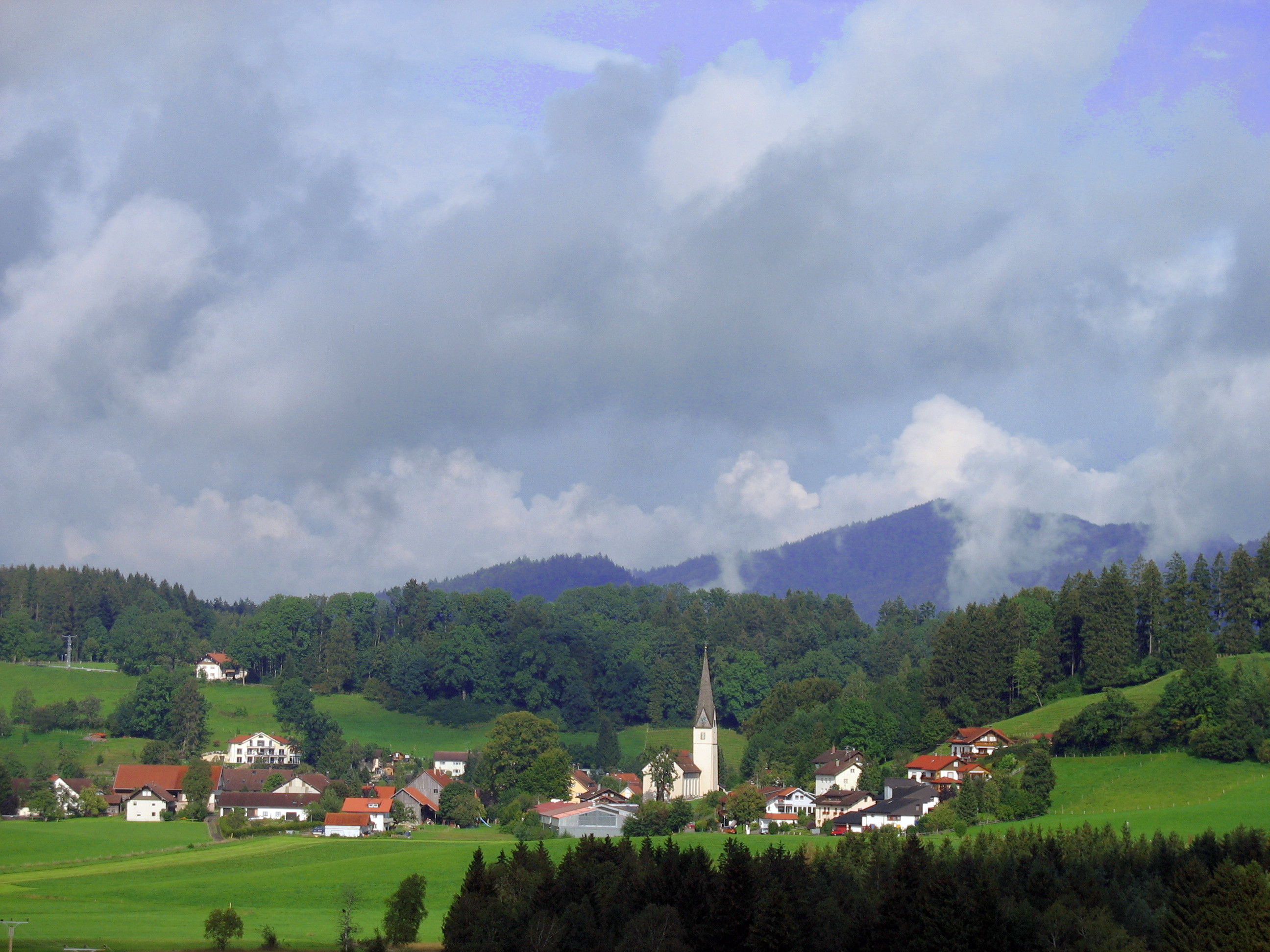 Blick vom Ortsteil Oberhäuser (Bahnhof) auf den Hauptort Röthenbach